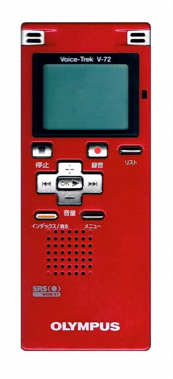 オリンパスのボイスレコーダー「OLYMPUS Voice-Trek V-72」レッド。